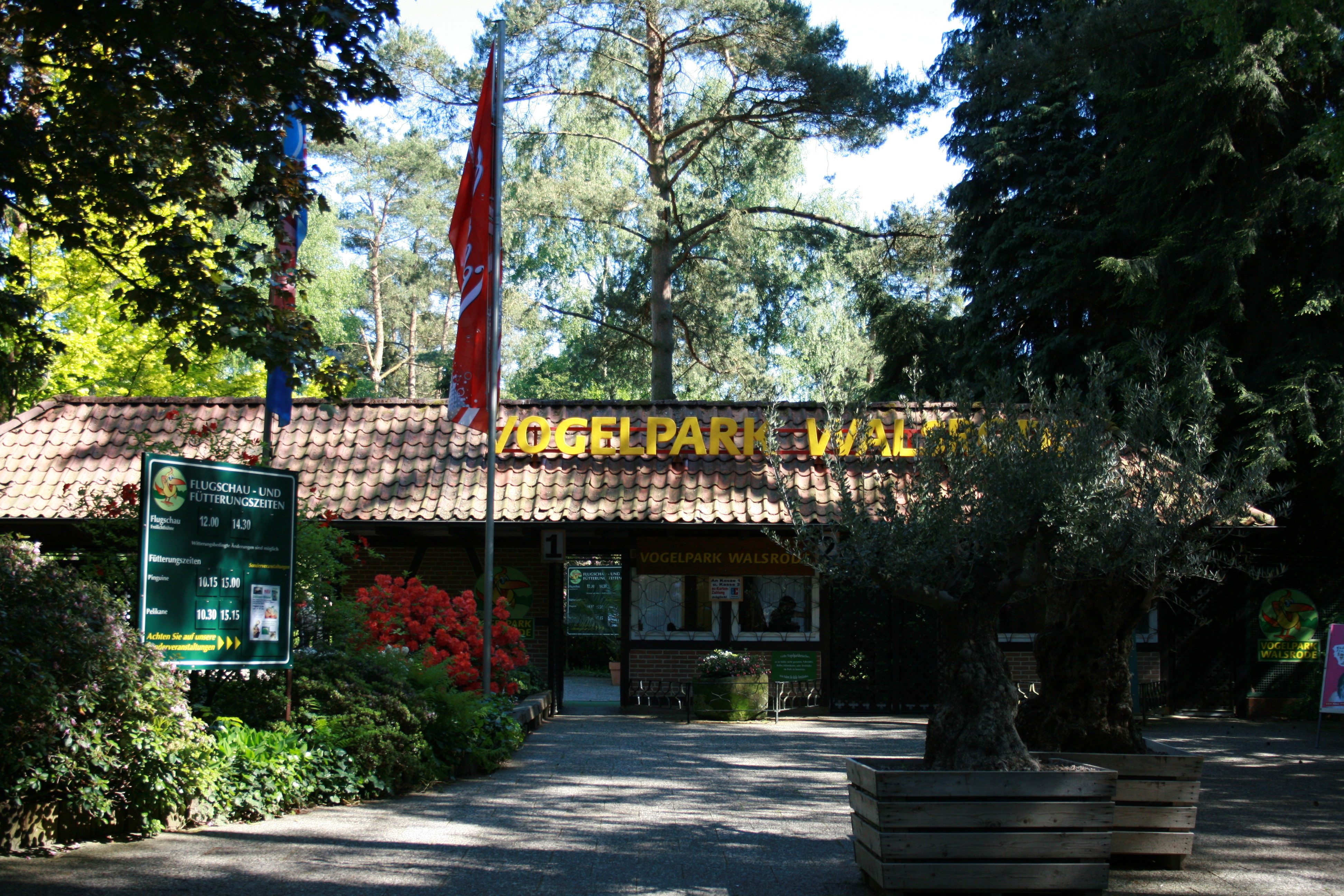 Vogelpark Walsrode, Parkplatz / Eingang